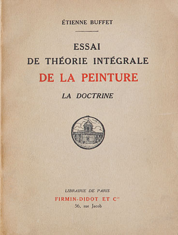 livre